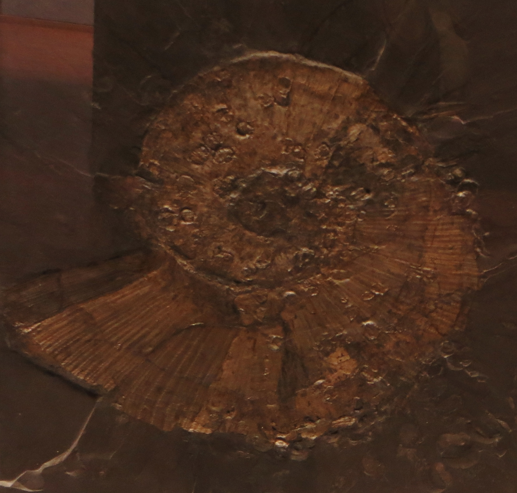 Fossil of Lytoceras- Took the picture at Museum am Lowentor, Stuttgart